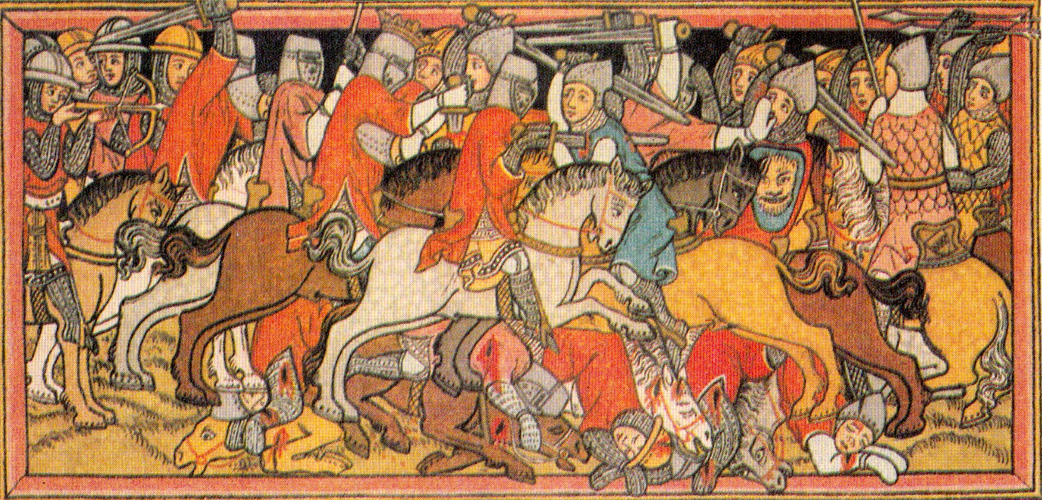 Schlacht in Winsen 1388. Durch sie wurde der Lüneburger Erbfolgekrieg beendet.